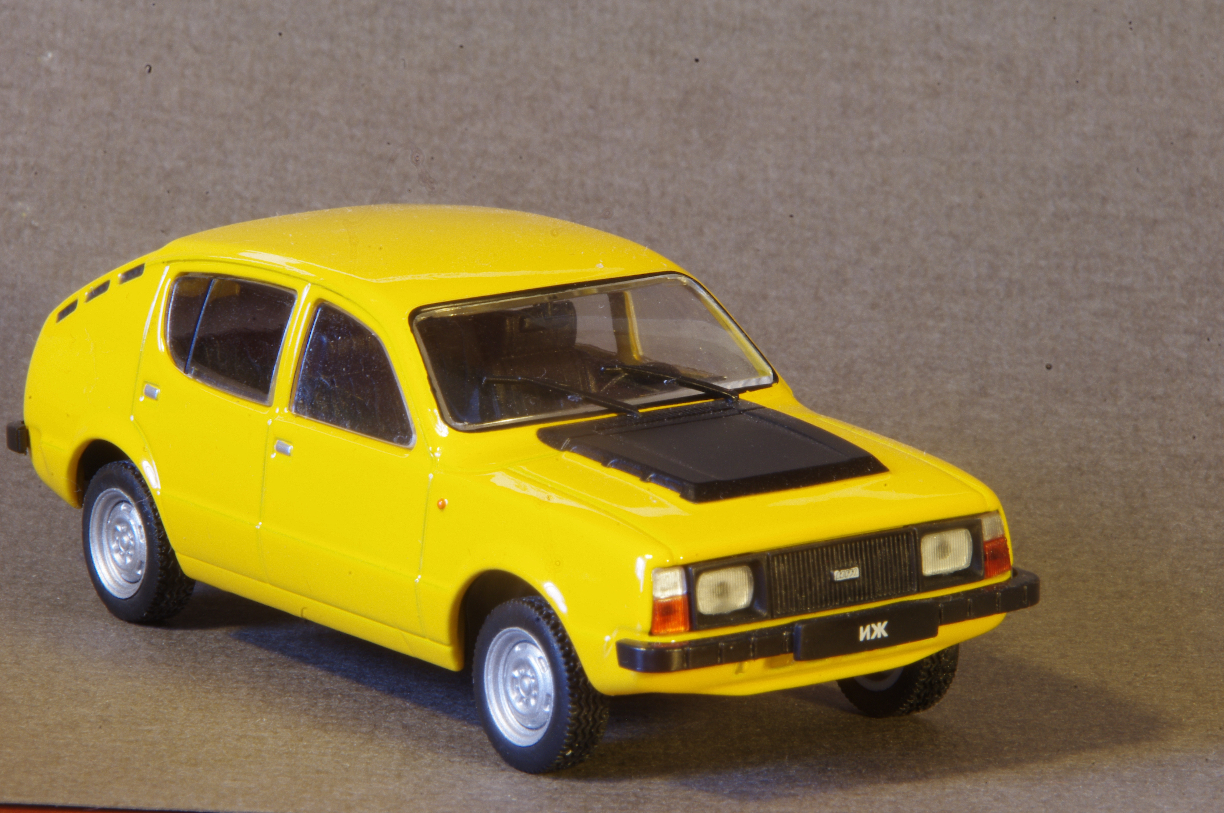 Модель ИЖ-13 "Автолегенды СССР" Deagostini Diecast model Izh-13 from Avtolegendy USSR Deagostini